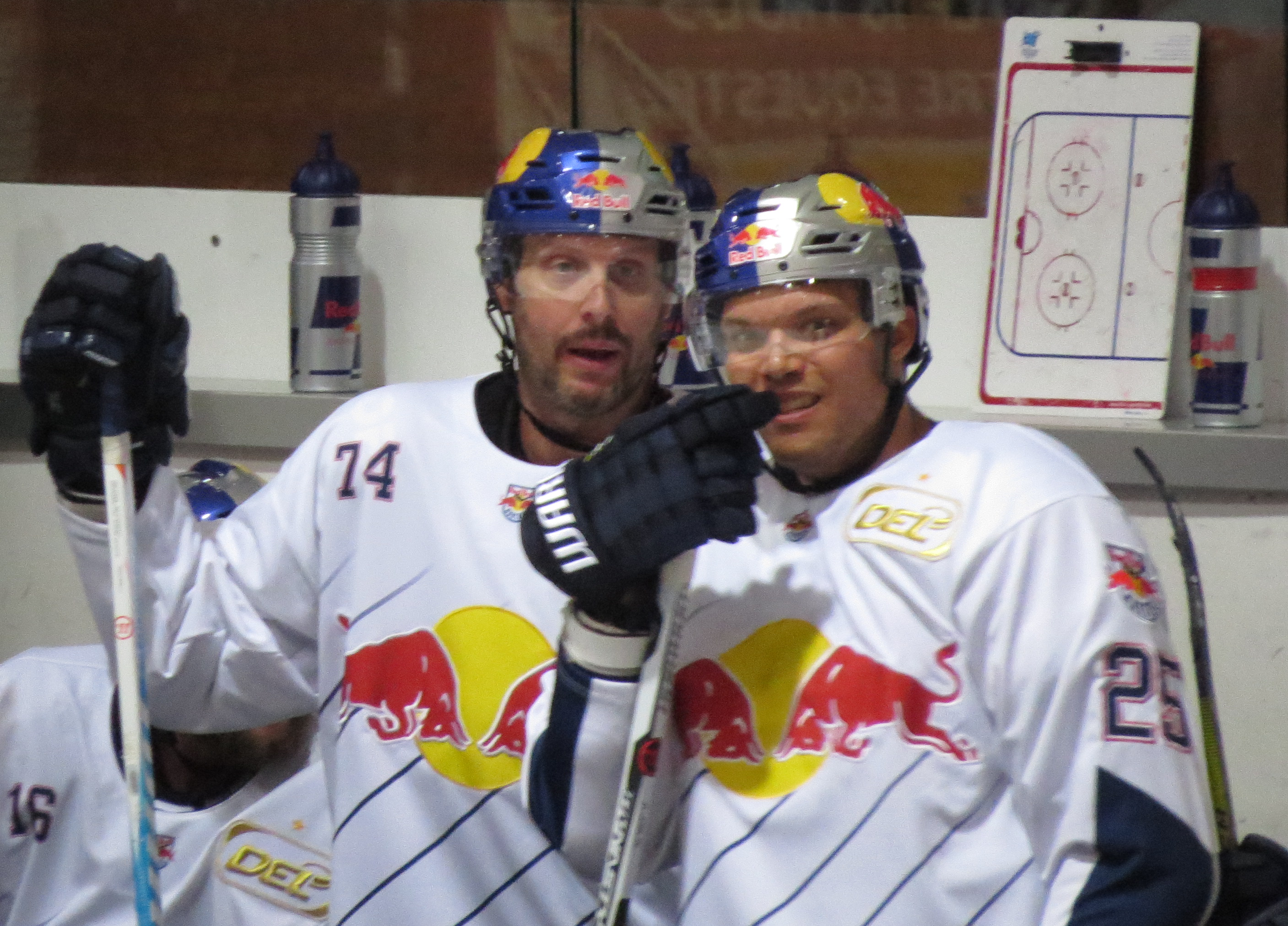 GSHC - Redbull Munich 74 : Deron Quint 25 : Derek Joslin